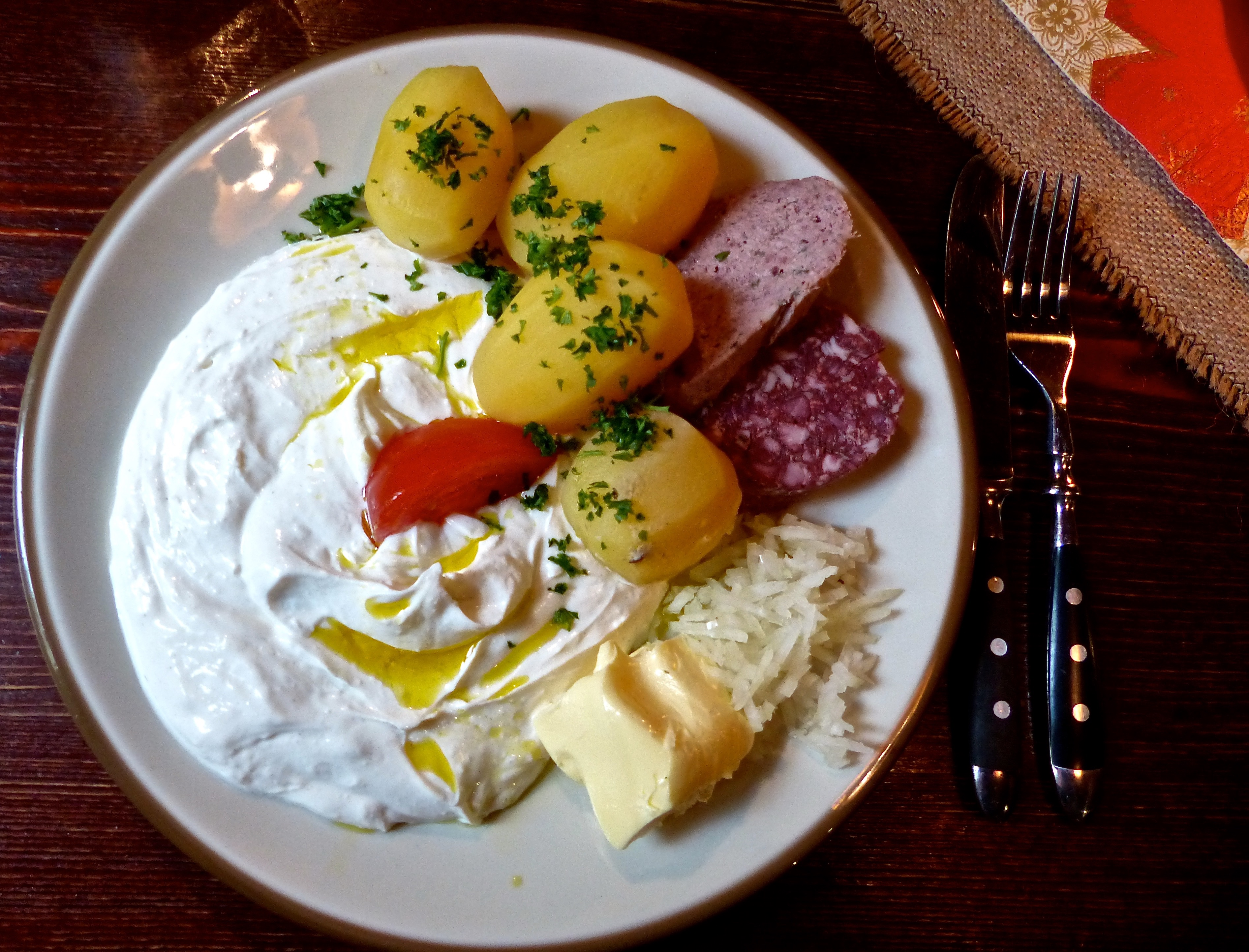 Quark mit Leinöl, Leberwurst und Blutwurst - traditionelles Weihnachtsessen im Erzgebirge, Dörnthaler Ölmühle